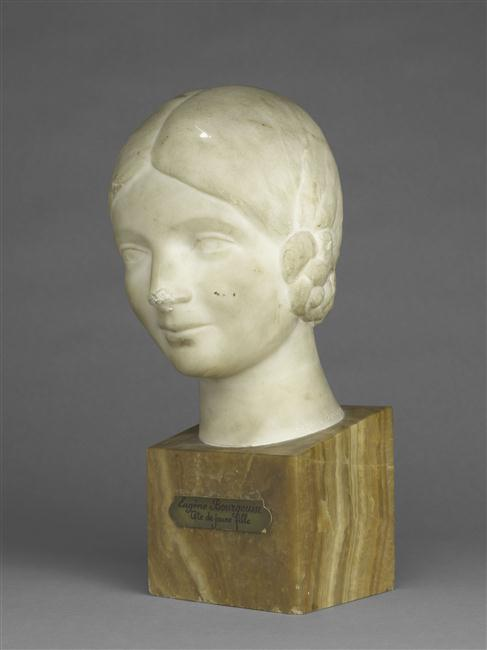 Tête de fillette aux macarons (Ondine), Acquisition en 1916. Attribution au Musée National d'Art Moderne, 1916